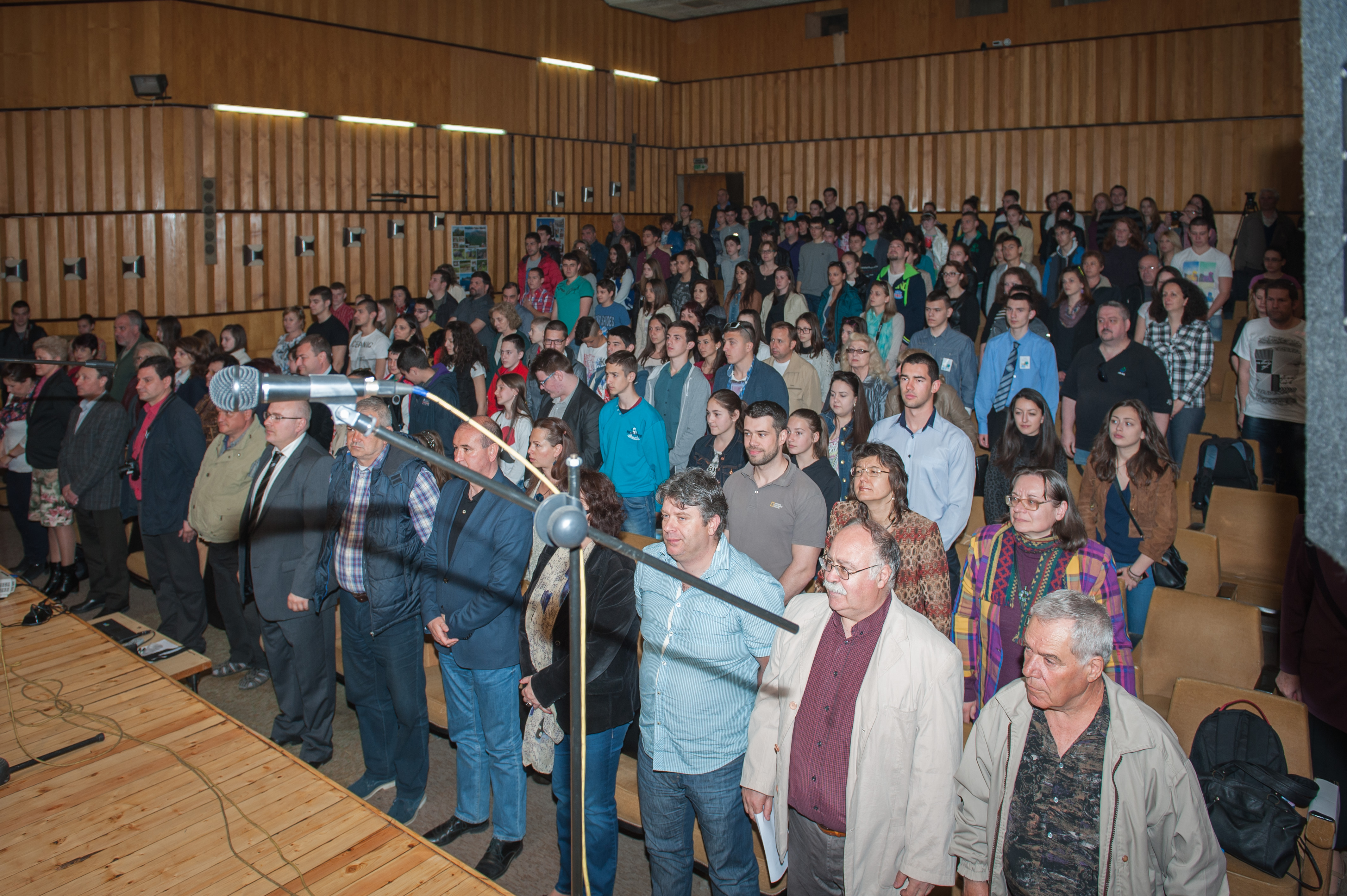 Церемония по откриване на Първия географски фестивал - Ямбол 2015